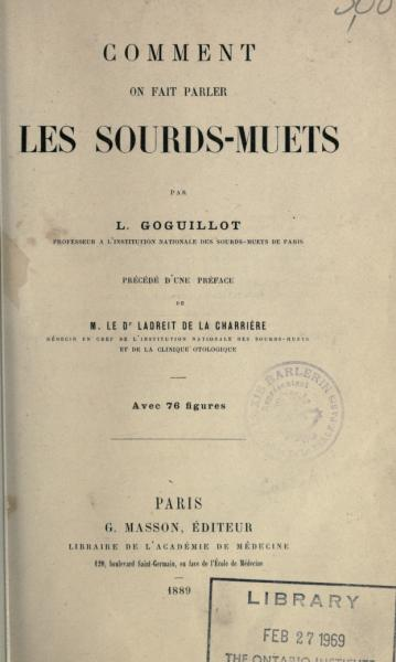 Comment faire parler sourds muets